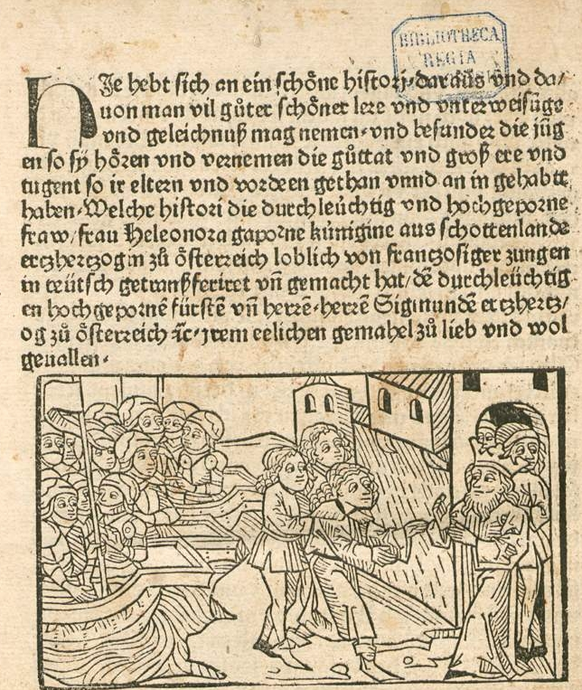 Augsburger Druck von Pontus und Sidonia